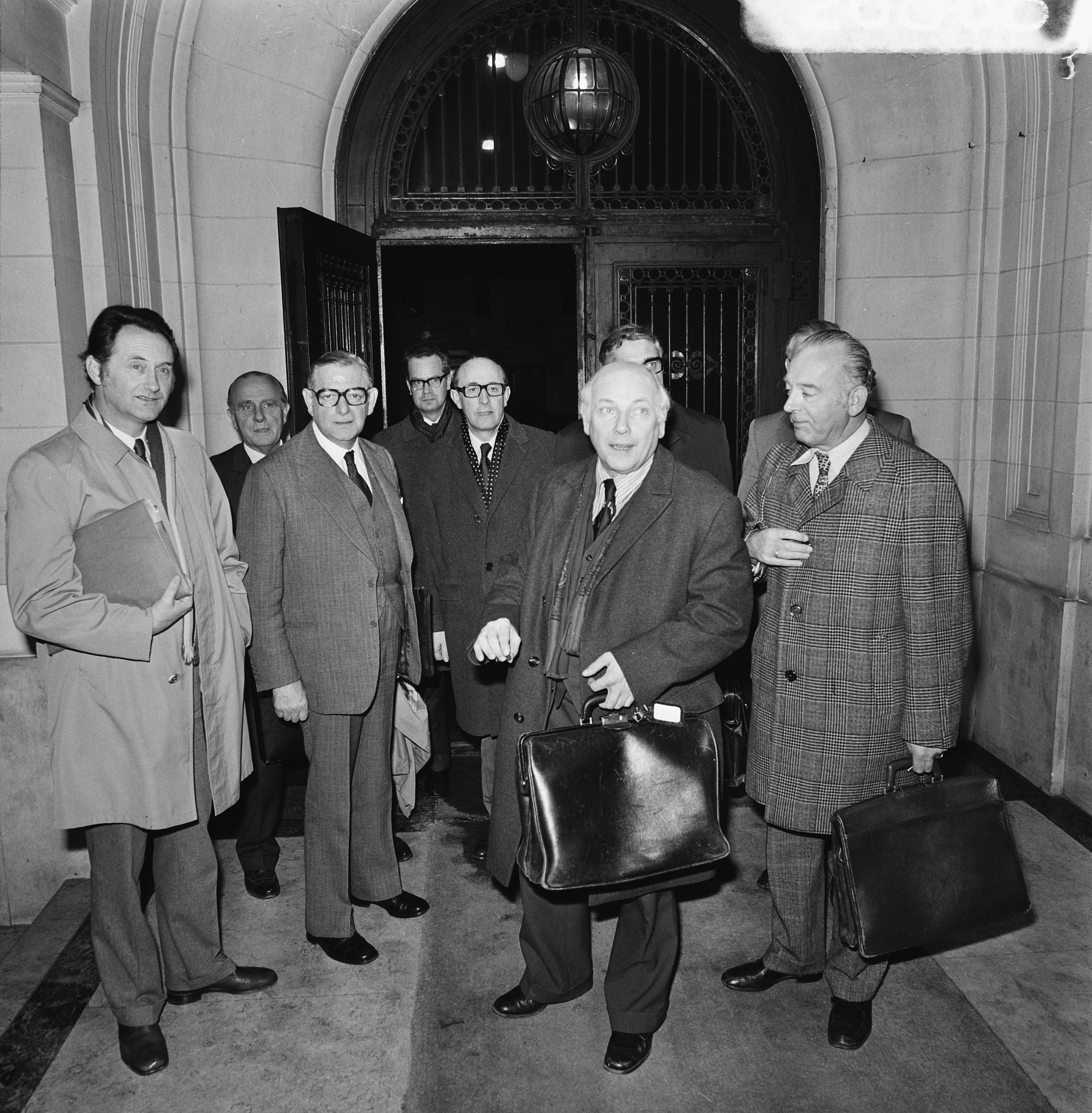 Collectie / Archief : Fotocollectie Anefo Reportage / Serie : Regering spreekt met delegaties van werkgeversbonden naar aanleiding van de oliecrisis Beschrijving : Aankomst bij de ingang van het Ministerie van Economisch Zaken; tweede van rechts premier Den Uyl , links minister Boersma en tweede van links Van Boven (voorzitter NCW) Datum : 4 december 1973 Locatie : Den Haag, Zuid-Holland Trefwoorden : delegaties, ministers, oliecrisissen, premiers, werkgeversorganisaties Persoonsnaam : Boersma, Jaap, Boven, Paul van, Uyl, Joop den Fotograaf : Mieremet, Rob / Anefo Auteursrechthebbende : Nationaal Archief Materiaalsoort : Negatief (zwart/wit) Nummer archiefinventaris : bekijk toegang 2.24.01.03 Bestanddeelnummer : 926-8681